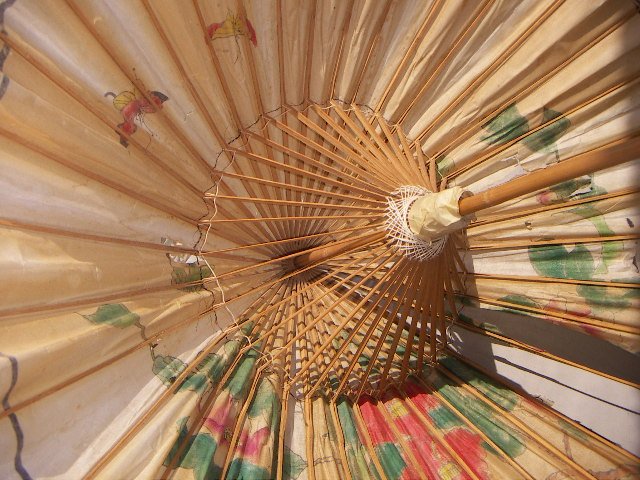 Parasol de bambú Jordi Coll Costa 19:07, 13 May 2005 (UTC)